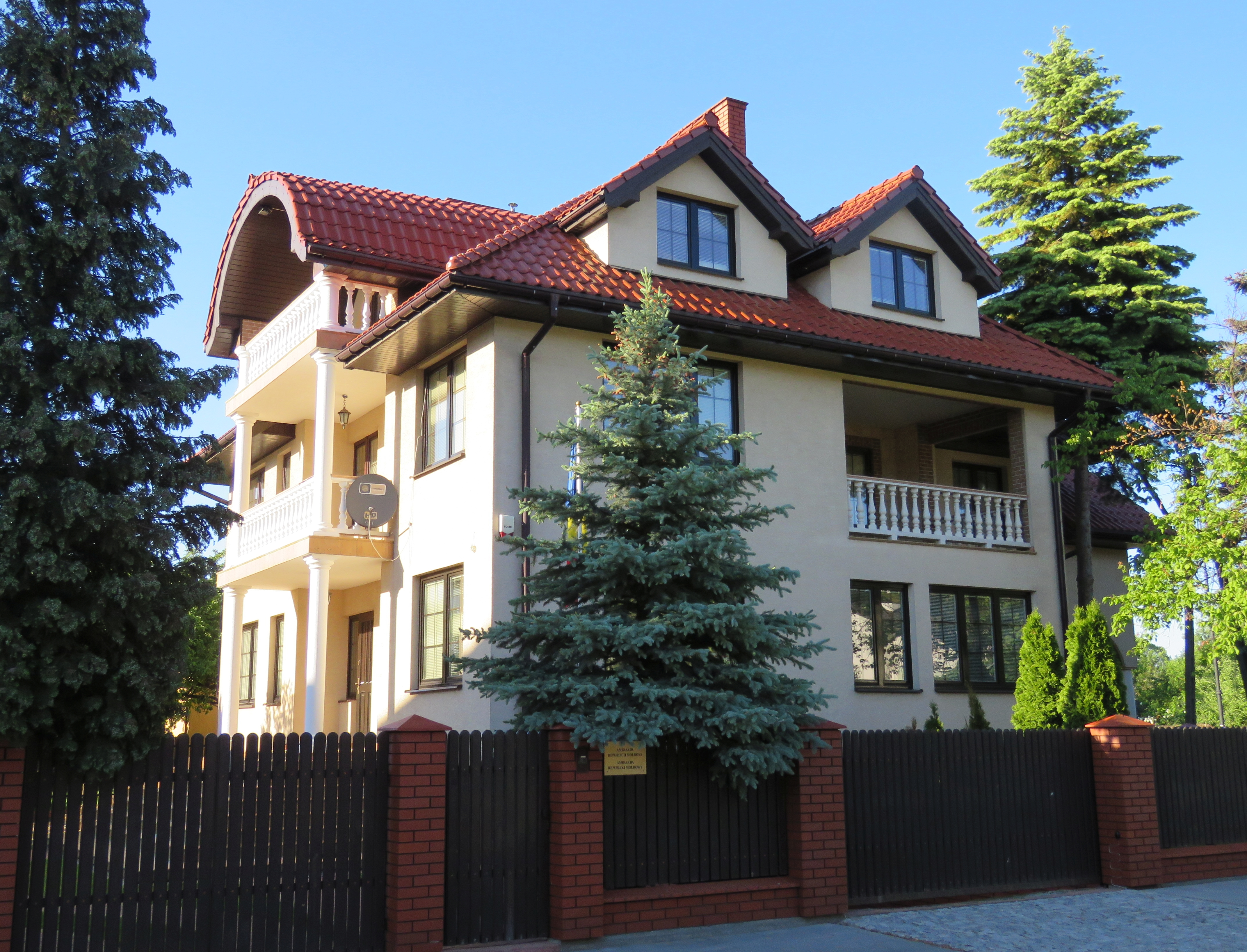 Ambasada Mołdawii w Polsce